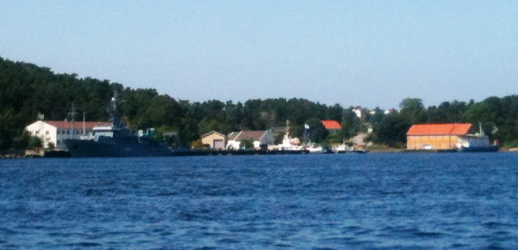 Marinebasen Marvika ved Kristiansand (Vest-Agder).